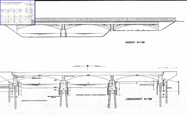 Ausführungsplan zur Verbreiterung, Detail